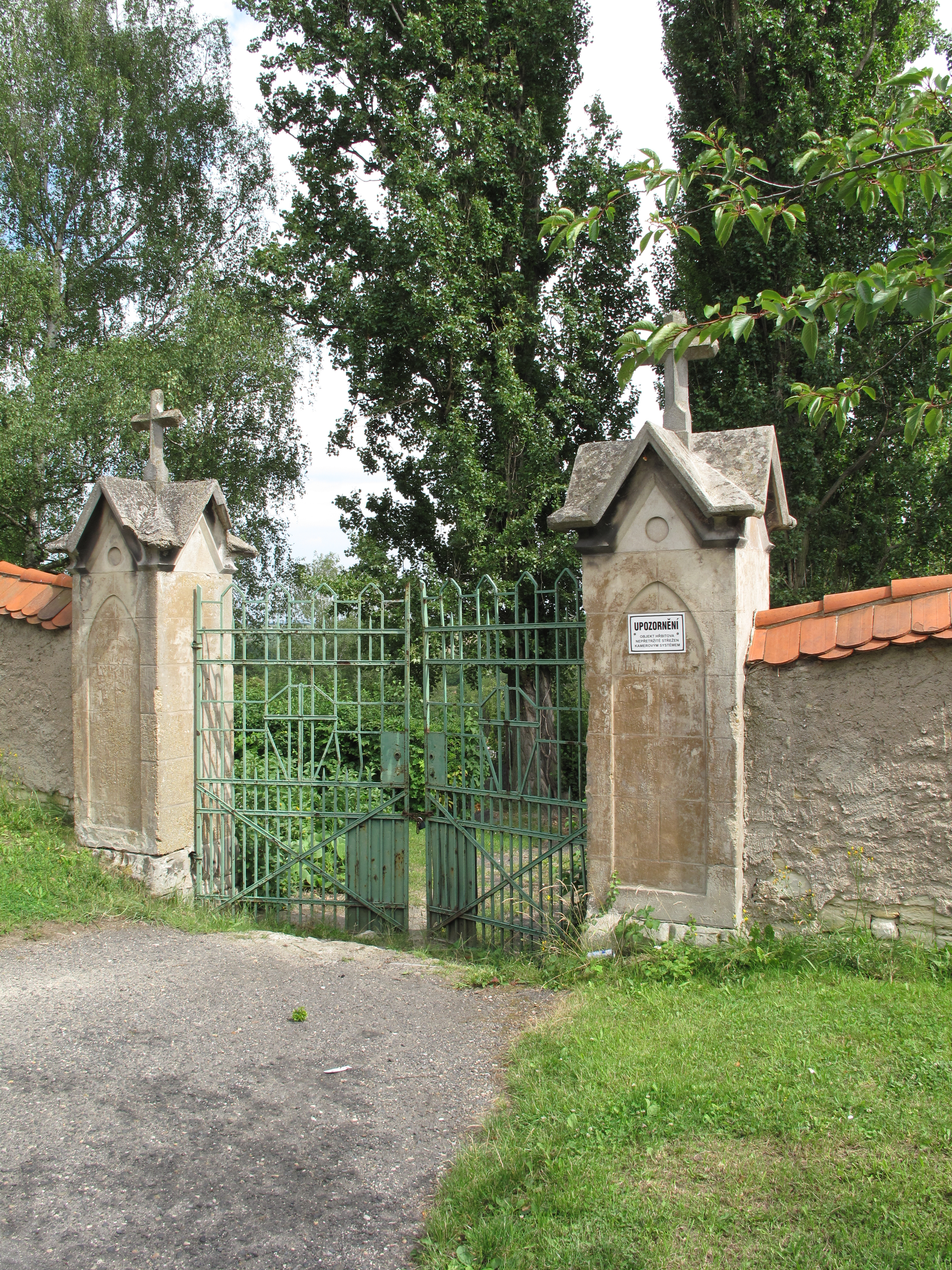 Slaný. Okres Kladno, Česká republika.